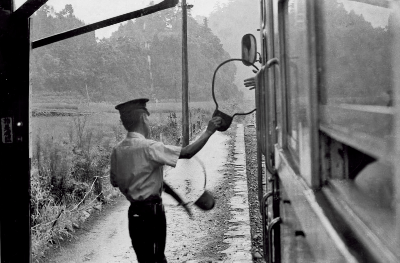 廃線迫る当時、大分交通耶馬渓線でのタブレット交換の模様。